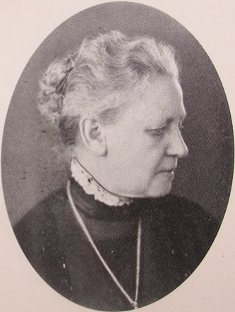 Augusta Österlund (1873-1955), svensk skolledare